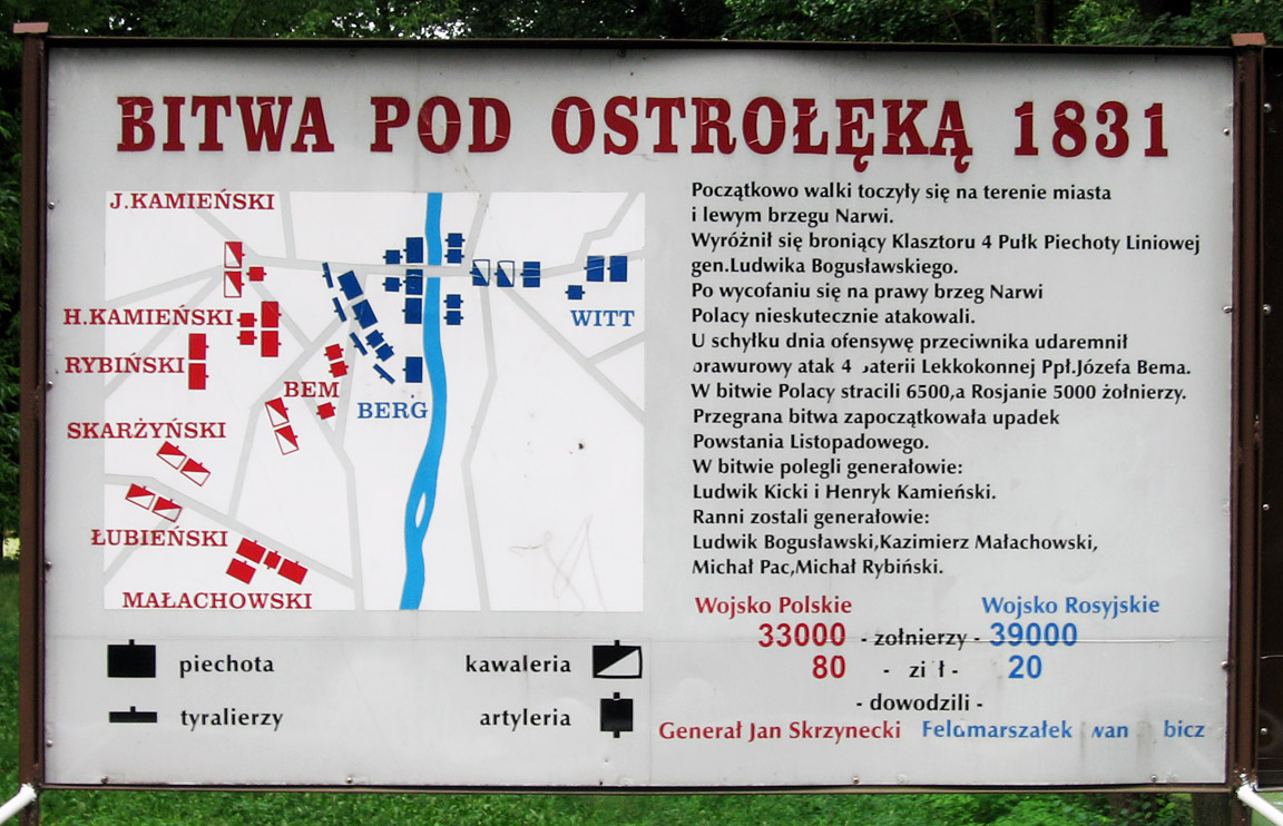 Tablica informacyjna dt. Bitwy pod Ostrołęką w 1831 r. przed Mauzoleum Powstania Listopadowego w Ostrołęce.